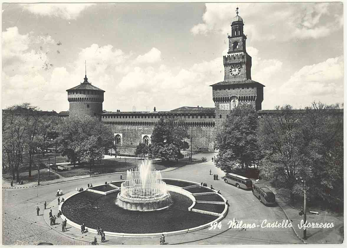 MI Milano Castello Sforzesco - a sinistra si vede una delle due torri cilindriche laterali che sono acquedotti